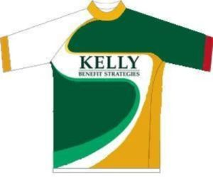 Maillot con los colores del equipo ciclista estounidense Kelly Benefit Stategies